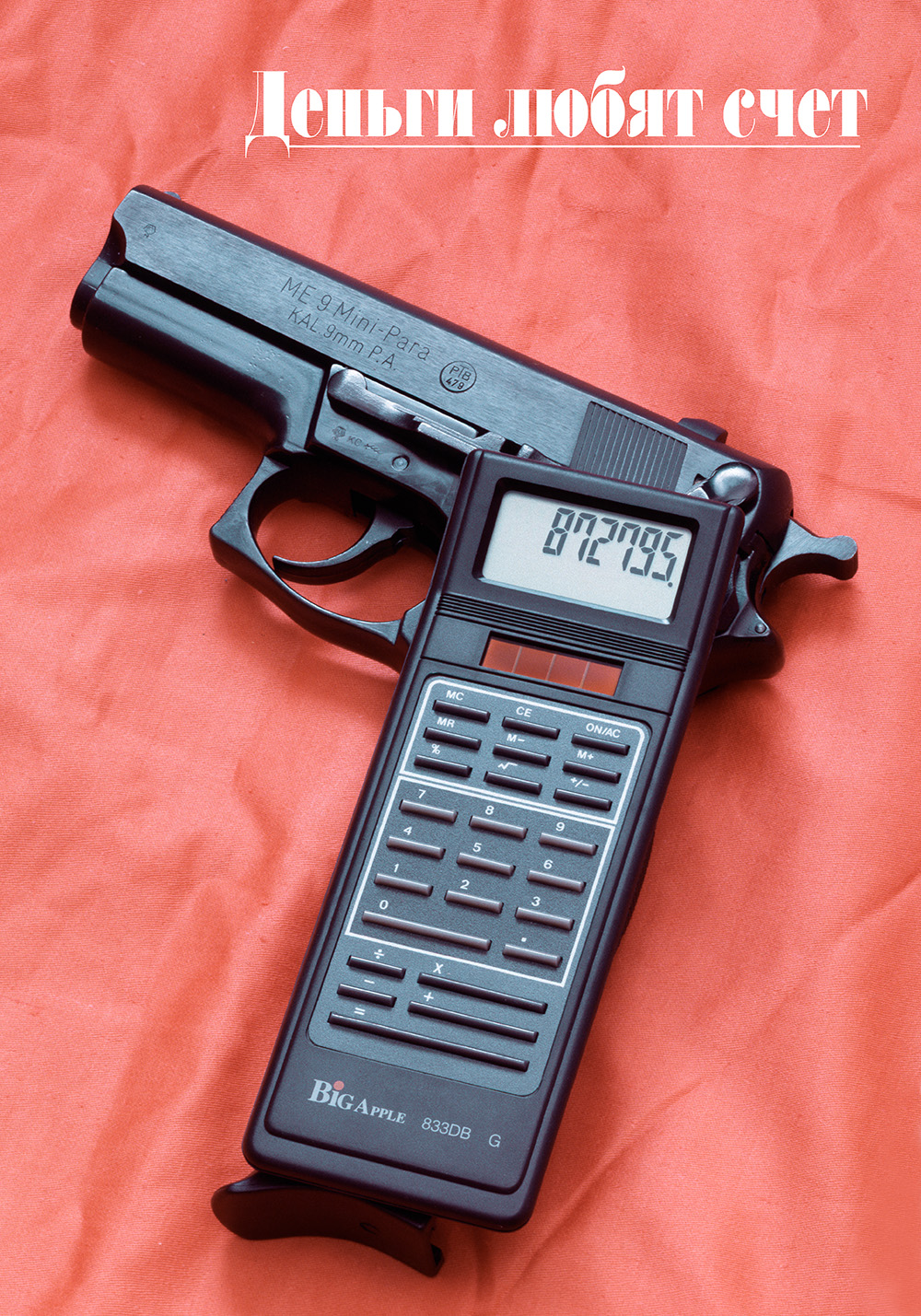 ДЕНЬГИ ЛЮБЯТ СЧЕТ. Постановочное фото, 70х100 см. 1999 г. "Пистолет" ME9 - не настоящий, а пугач.